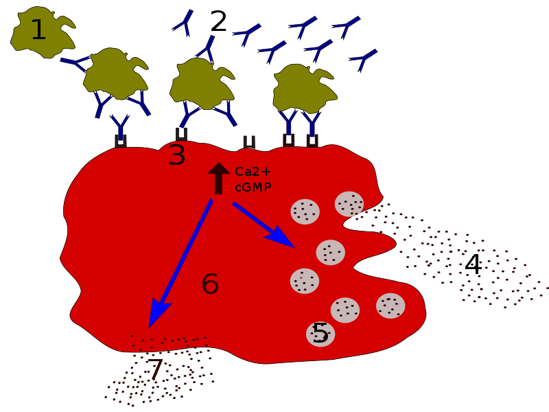 Degranulacija 1 - antigen; 2 - IgE; 3 - FcεRI receptor; 4 - medijatori (histamin, proteaze, hemokini, heparin); 5 - granule; 6 - mastocit; 7 - novoformirani medijatori (prostaglandini, leukotrieni)